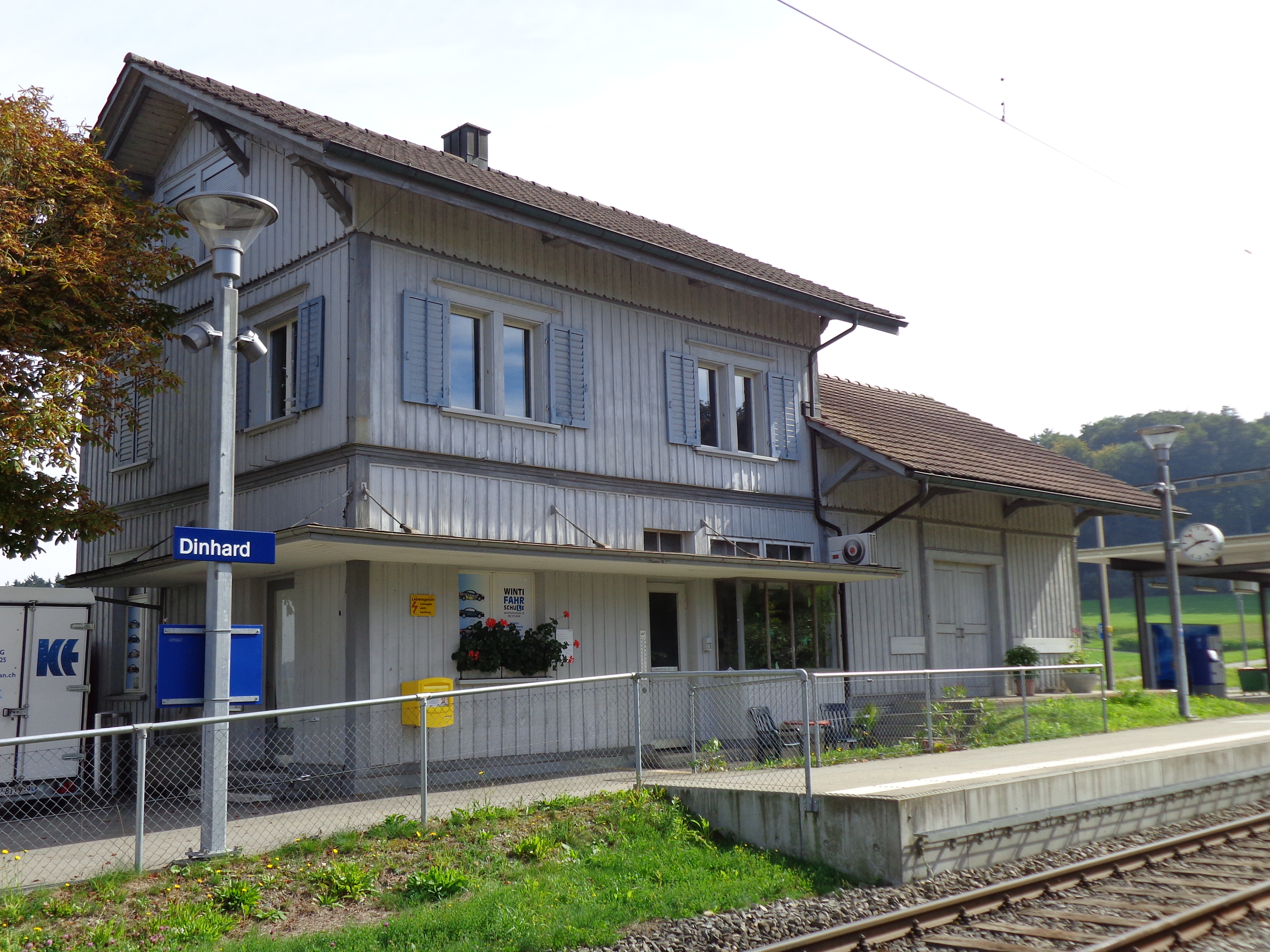 Bahnhof Dinhard, Aufnahmegebäude mit Güterschuppen, ID 21600143